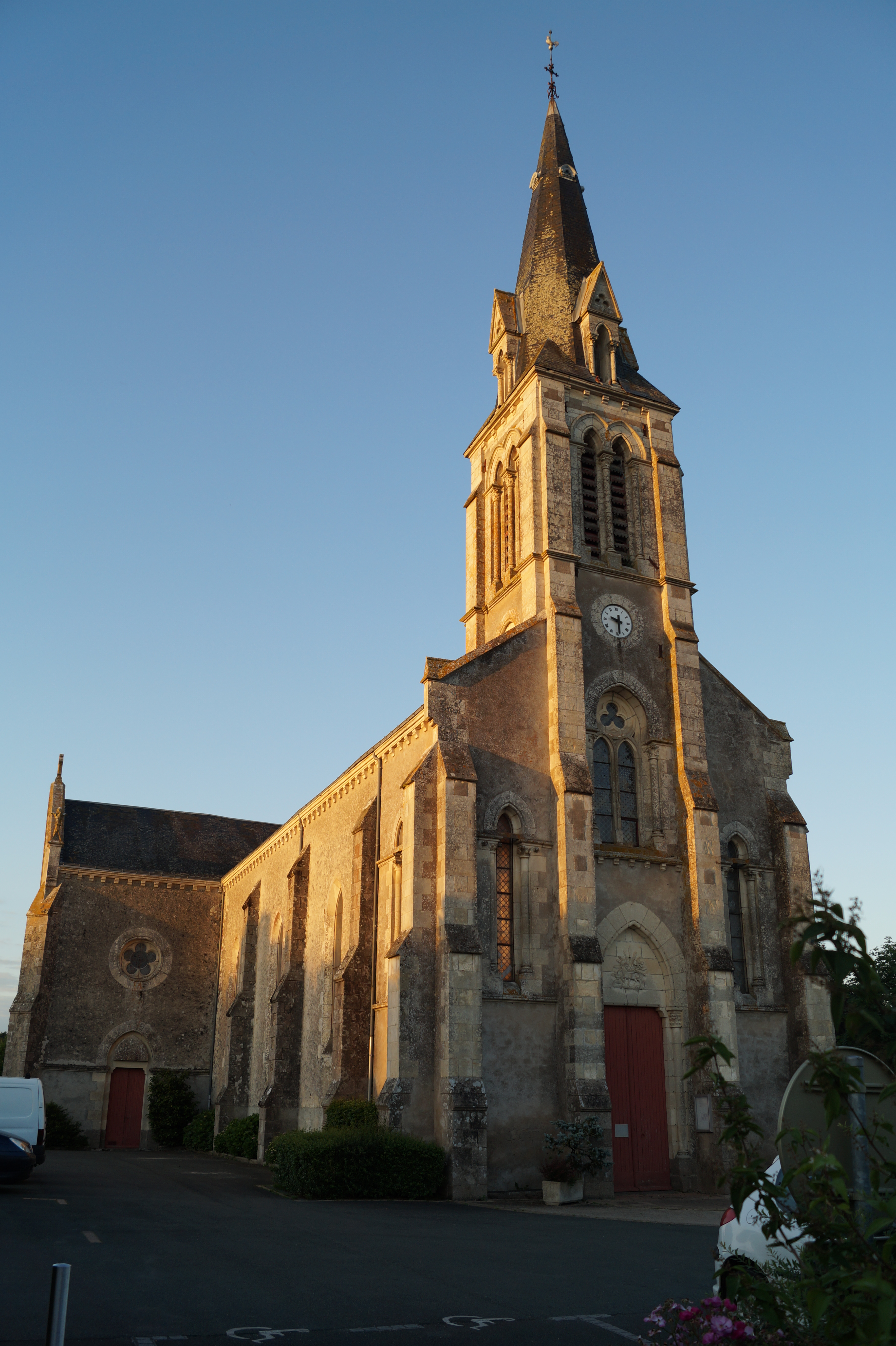 L’église Saint-Sauveur de Chaillé-sous-les-Ormeaux depuis la place de l’Église.